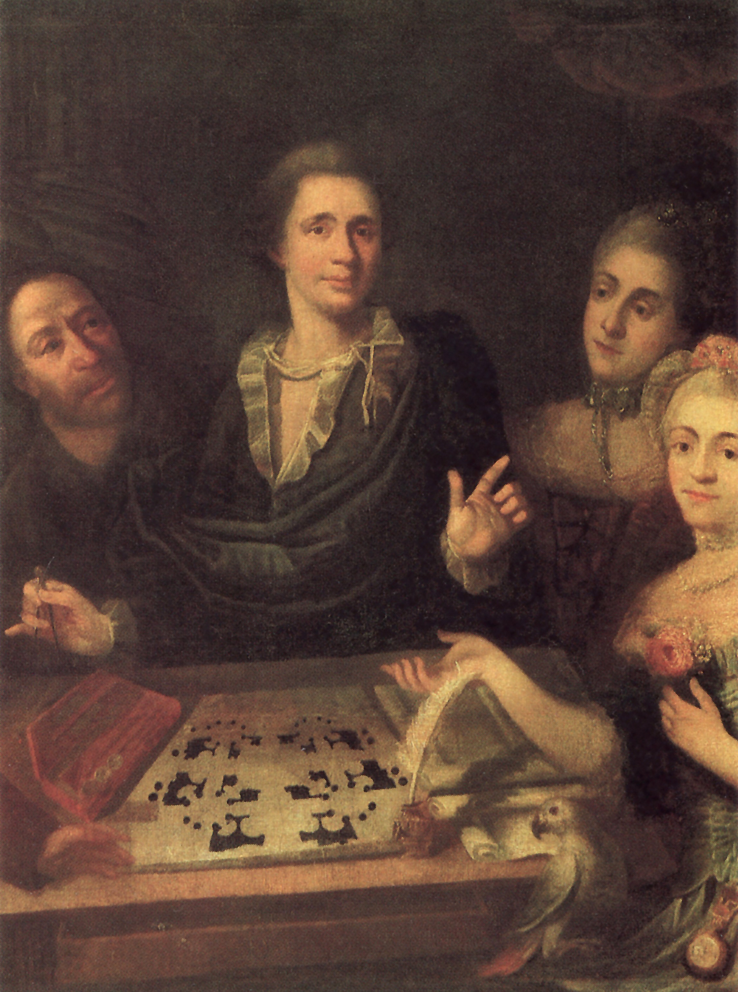 «Архитектор В. И. Баженов в кругу семьи»